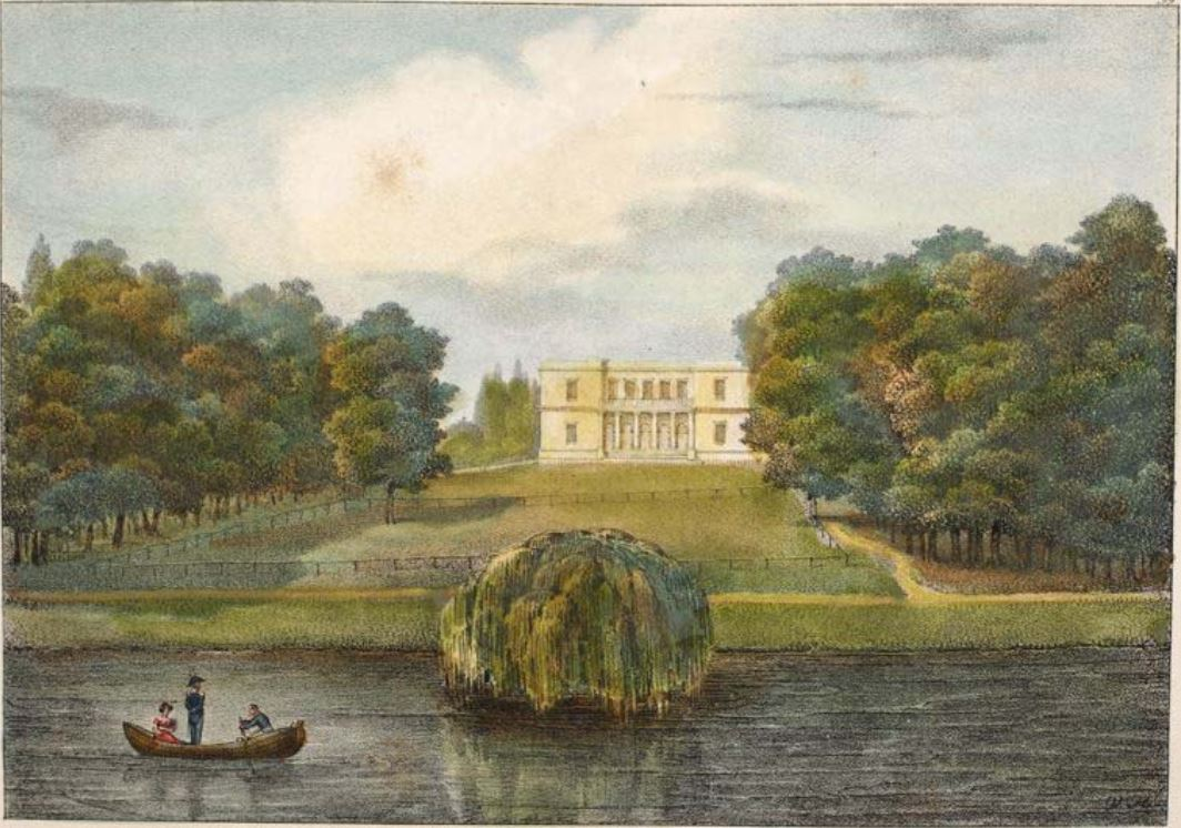 Pavillon de S.A.R. le Prince Héréditaire, à Tervuren.